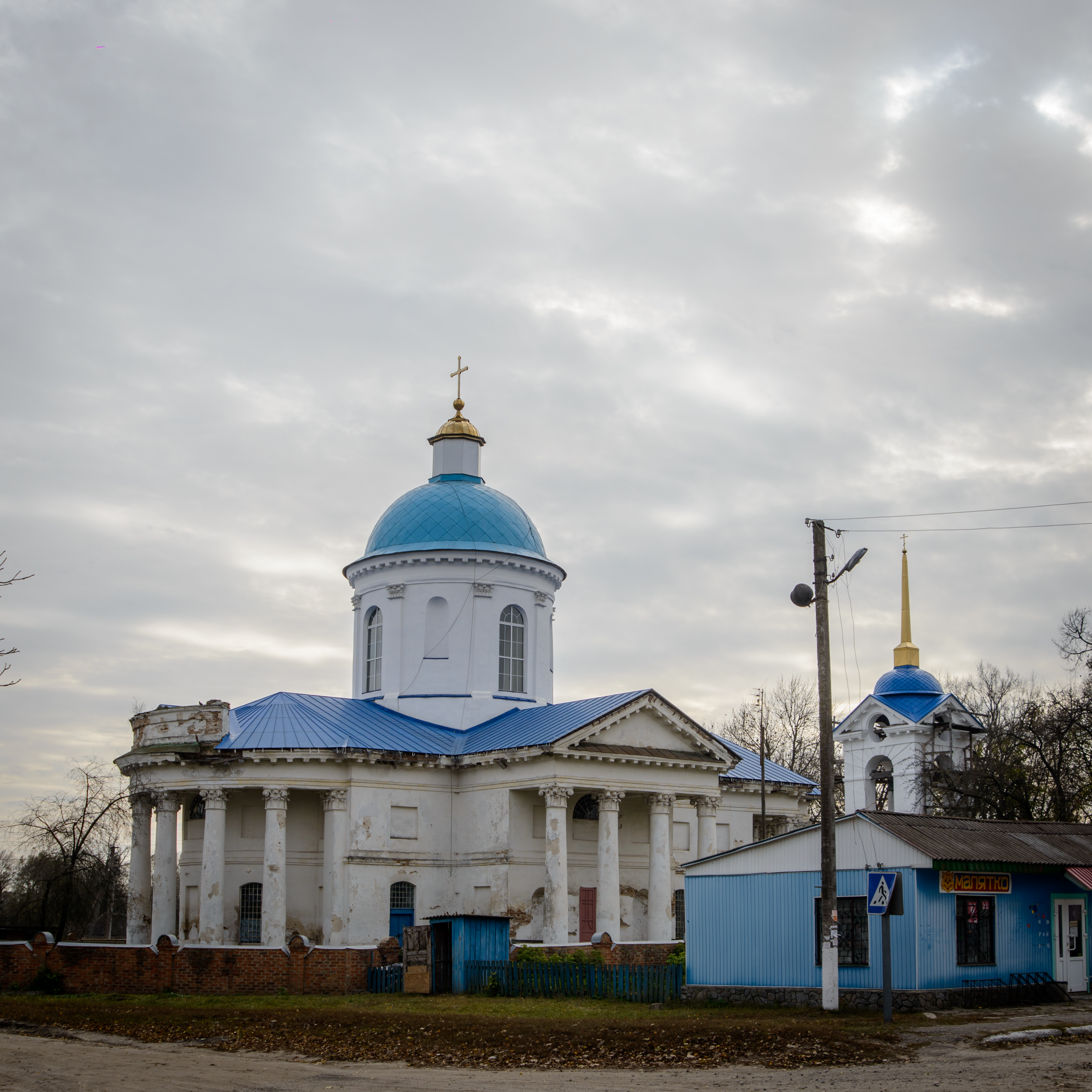 Успенська церква (мур.), с.Веприк